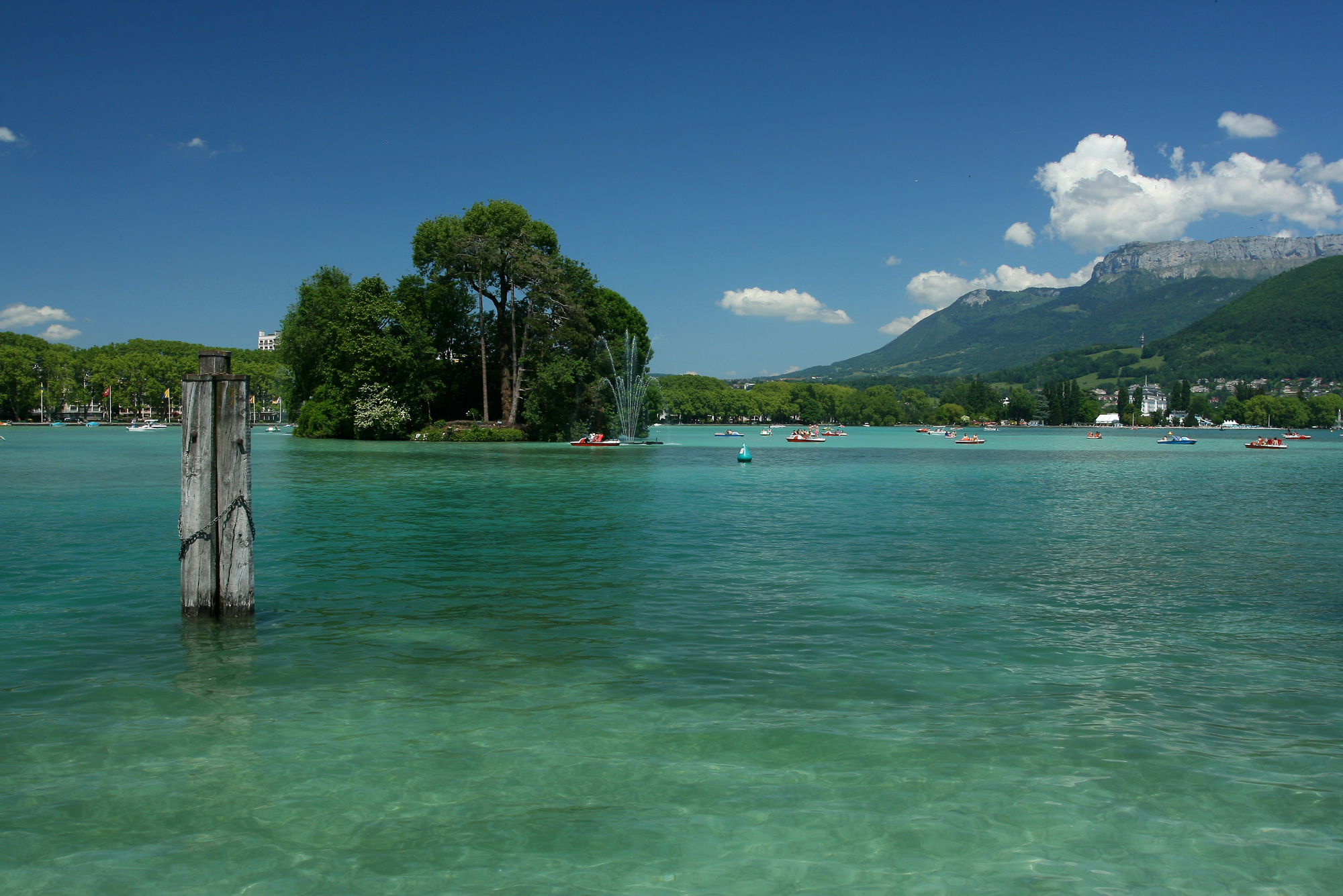 Lac d'Annecy